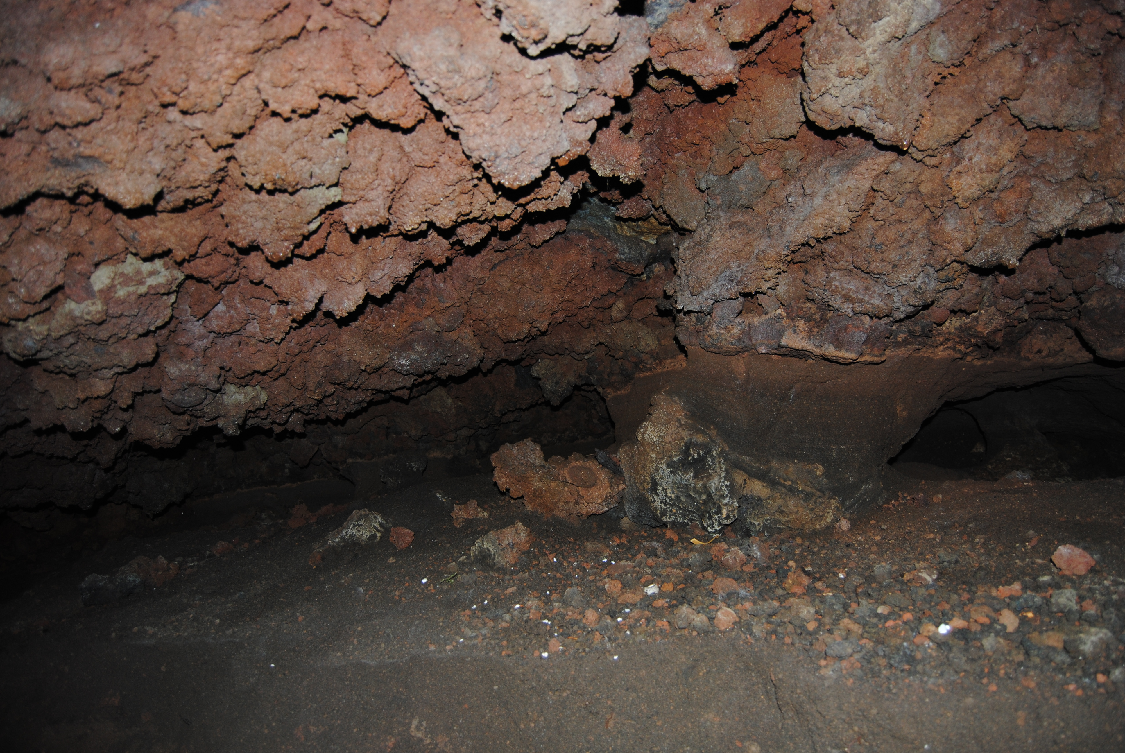 Cava di ghiara, detta anche rena rossa, presso Mascalucia (Catania).